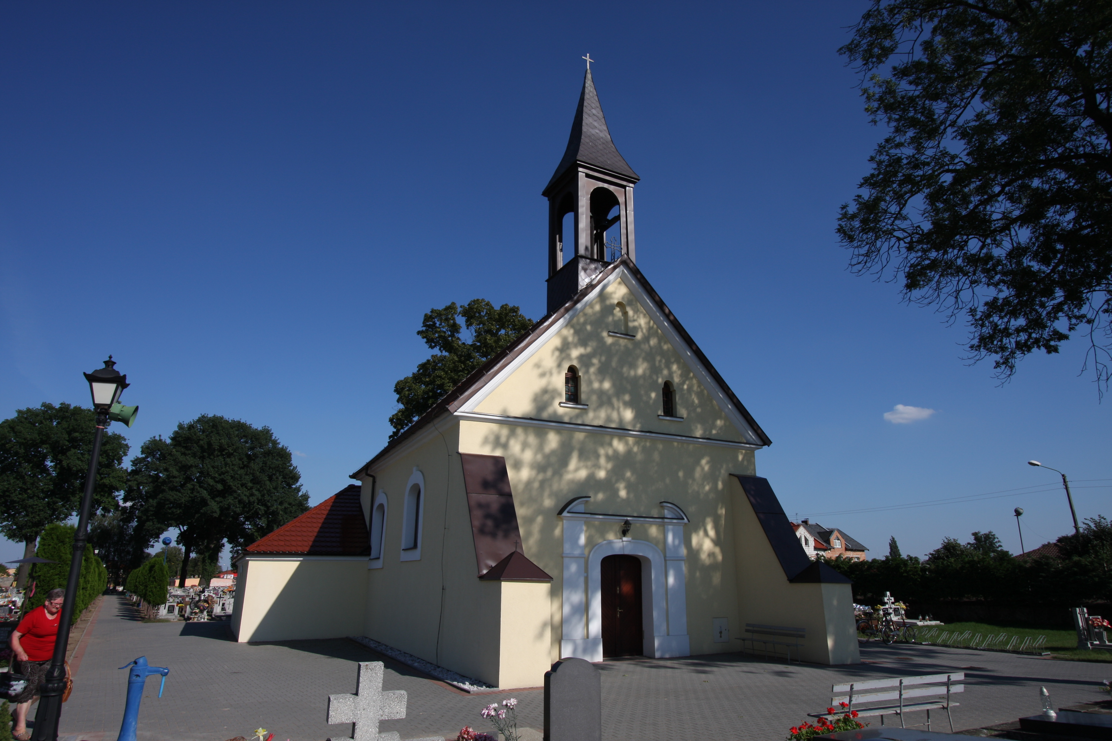 Babimost, kaplica cmentarna p.w. św. Jacka, mur., 1740, 1850, ul. Wolsztyńska